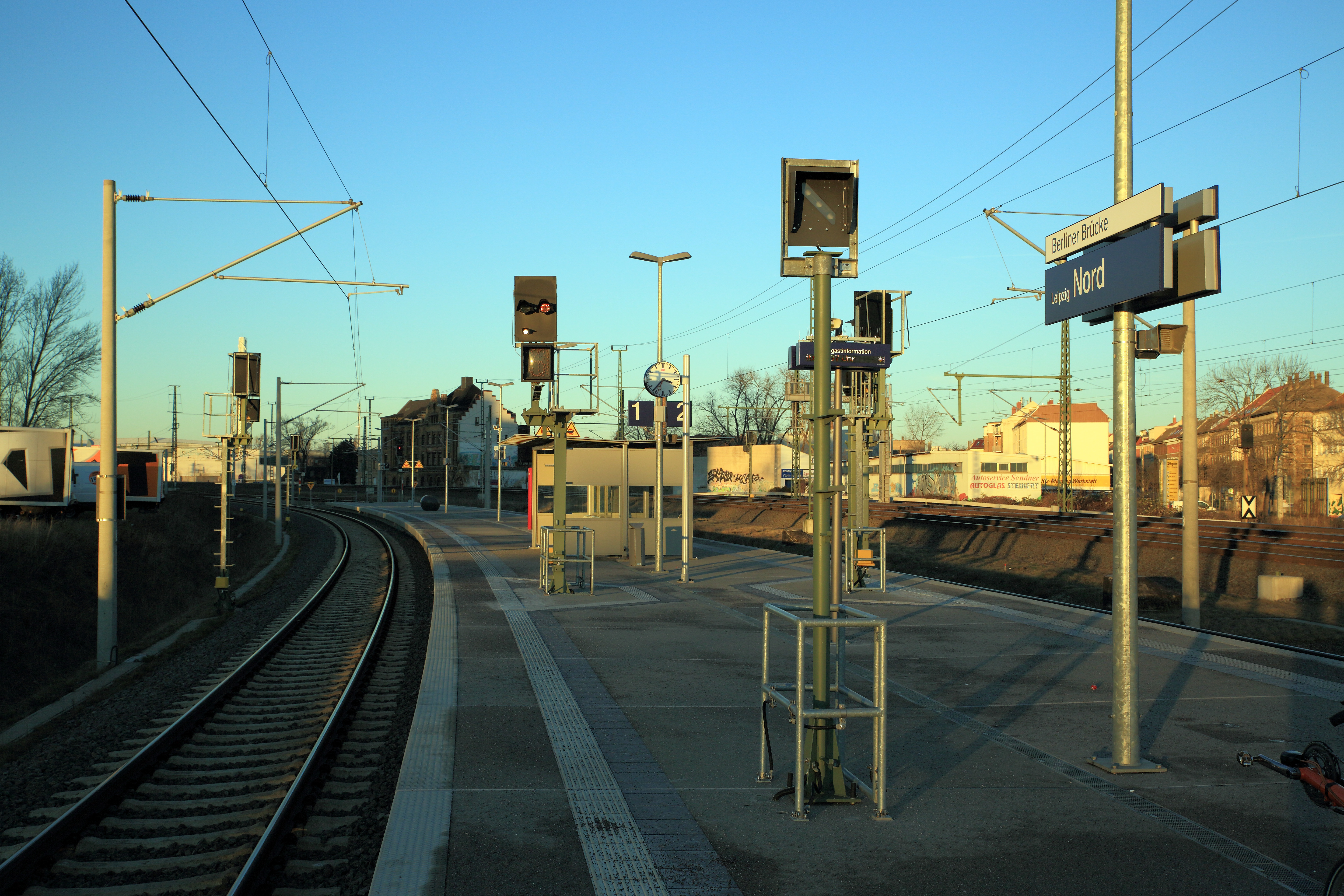 Bahnsteig Richtung Norden, hier gibt es trotz unterschiedlicher Ziele weder Zugzielanzeiger noch einen echten Wetterschutz. Für das S-Bahn-Netz ist das ein bisschen schwach, die kleine Wartehütte ist ziemlich mager.